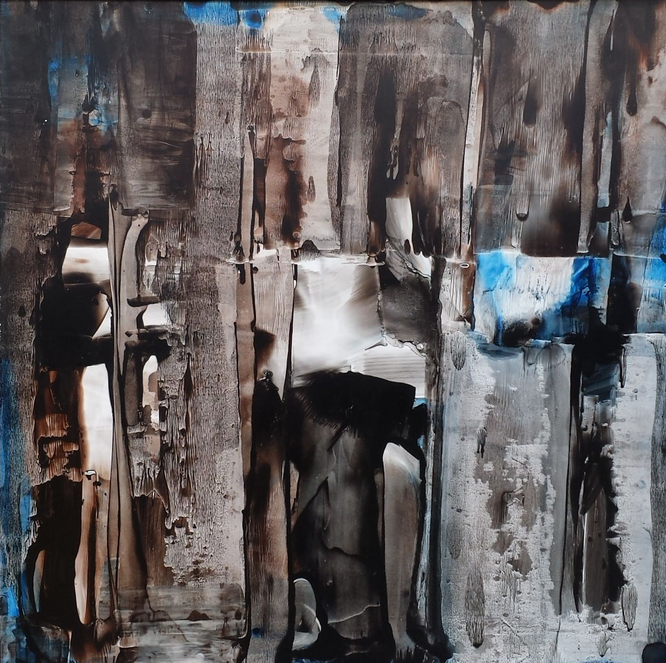 1975 Max Kuatty, olio su tela, cm 140x140